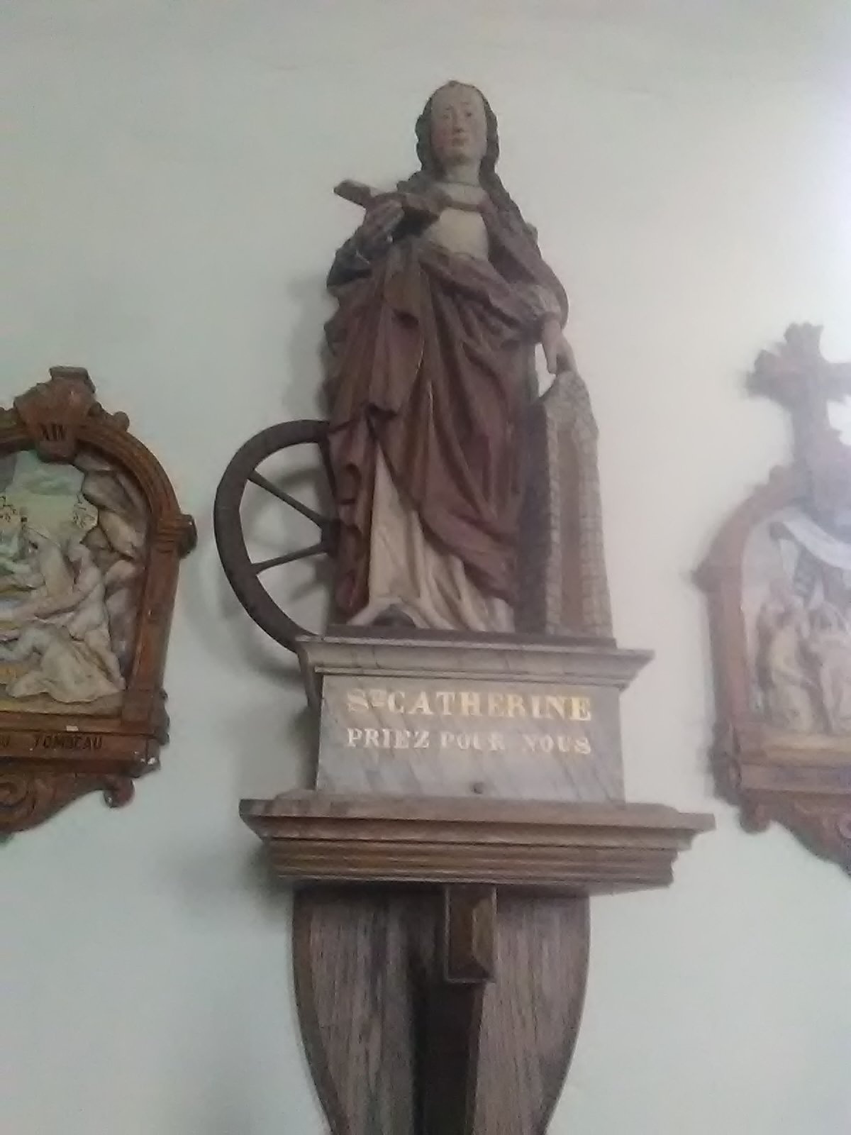 Culte Catholique